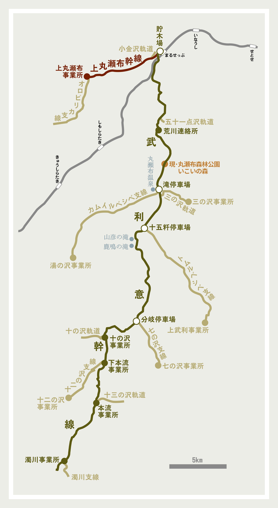 武利意森林鉄道の路線見取り図。丸瀬布森林公園いこいの森掲出の夢里塾による案内看板記載資料より作成